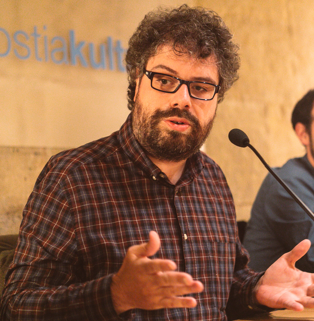 Sergio del Molino & Iván Repila Literaktum 17 Liburutegi Nagusia Argazkilaria/fotógrafa: Lorena Otero